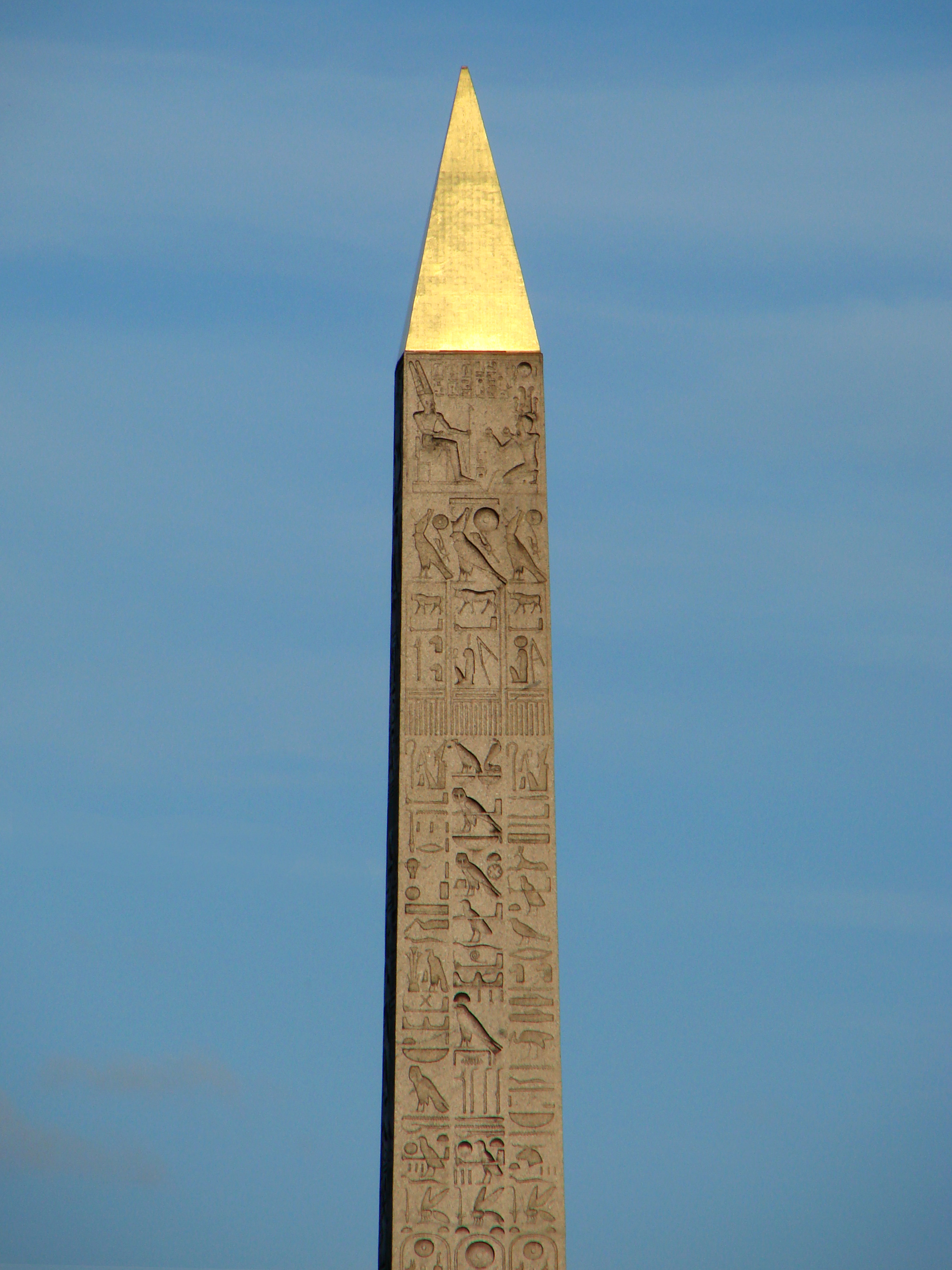 L'obélisque de la Place de la Concorde à Paris, avec son sommet doré: le pyramidion.